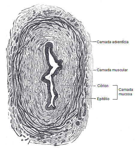 Secção transversal do ureter mostrando suas estrutura histológica